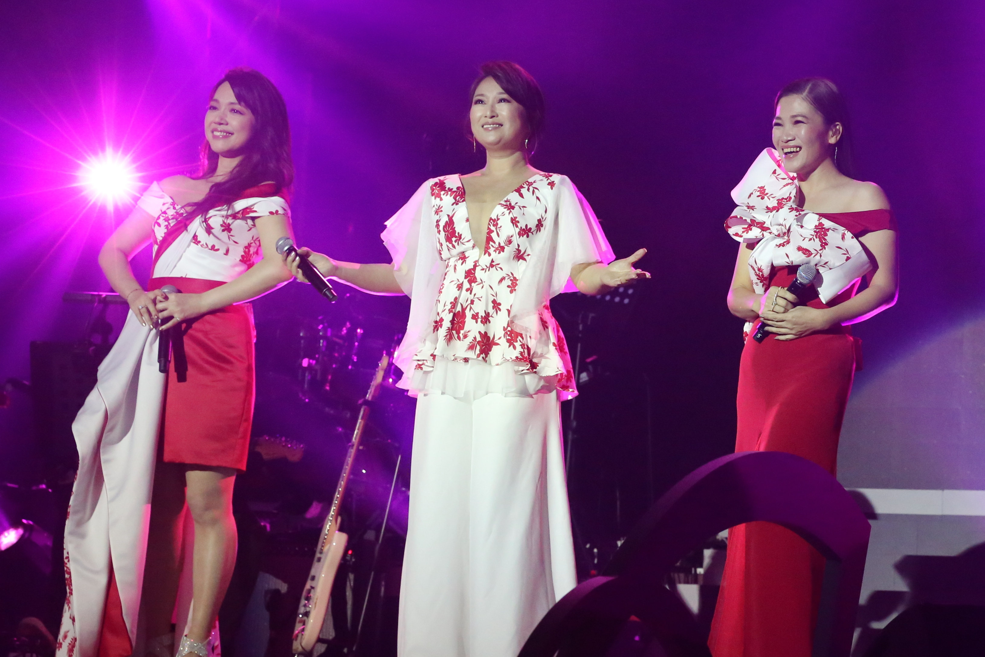 中文（台灣）: 姬情台三線口碑場演唱會（攝於三創數位生活園區五樓）